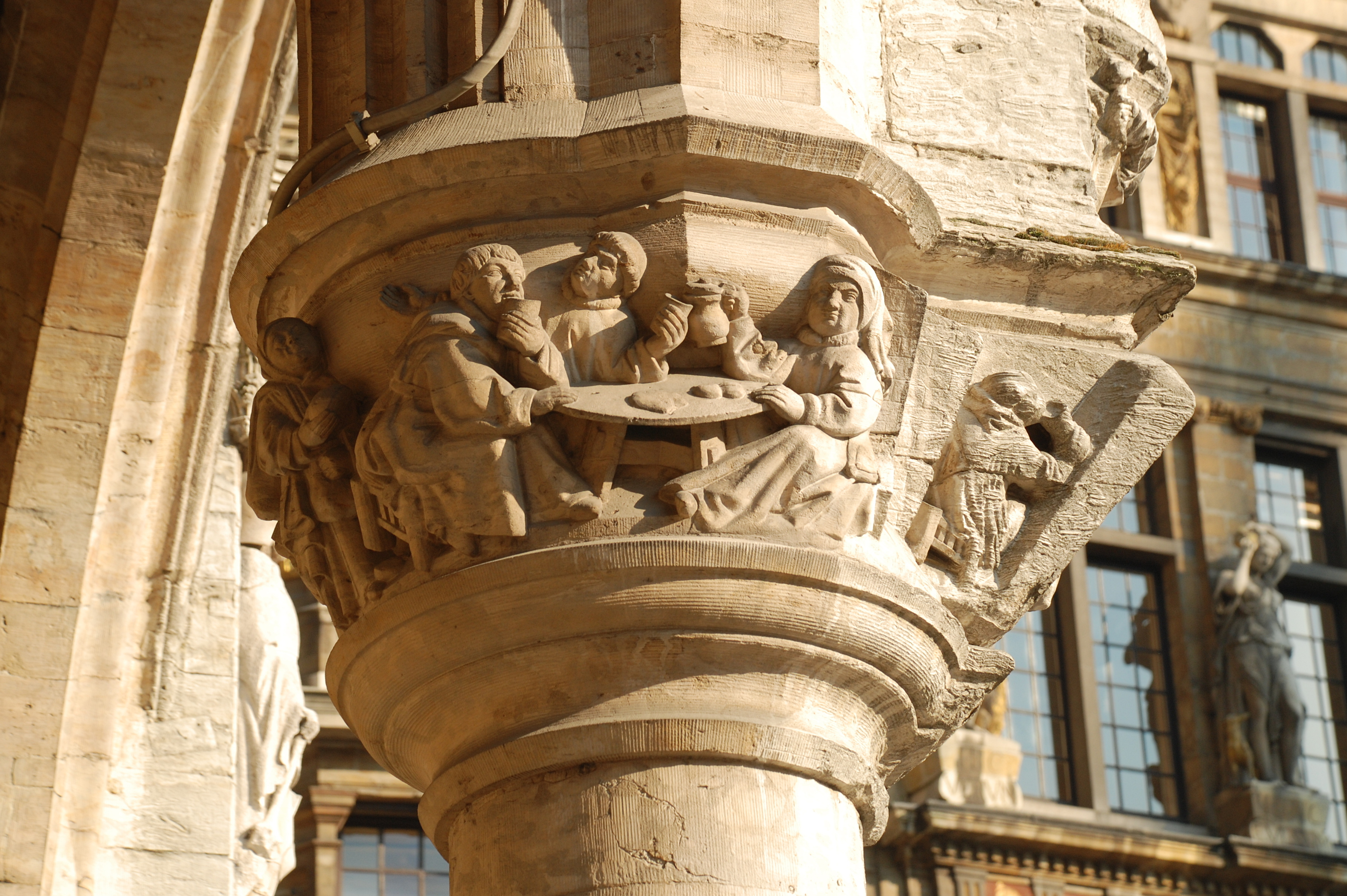 Belgique - Bruxelles - Grand-Place - Hôtel de ville - Cellier des Moines